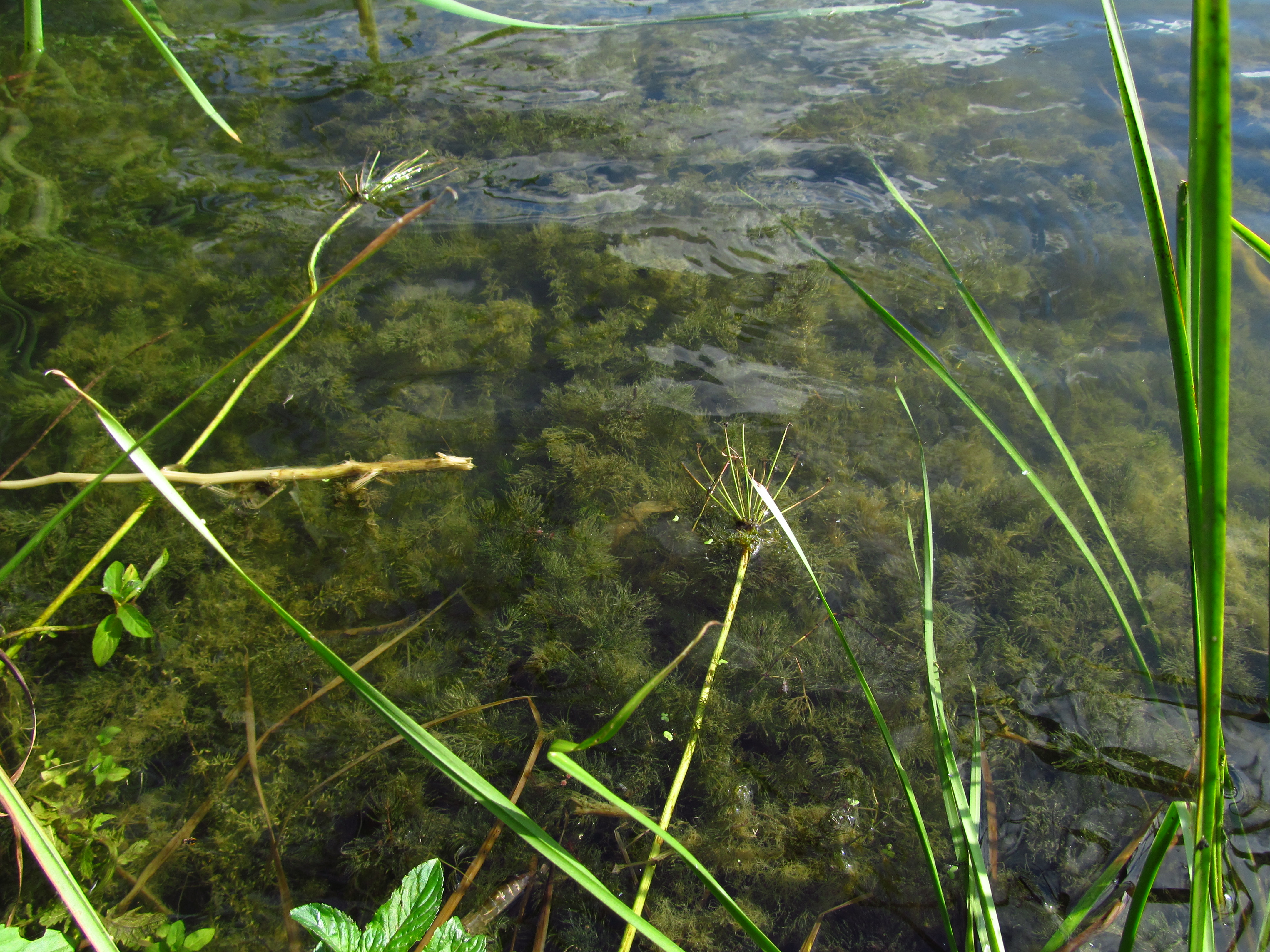 Srpski (latinica): drezga (Ceratophyllum demersum)